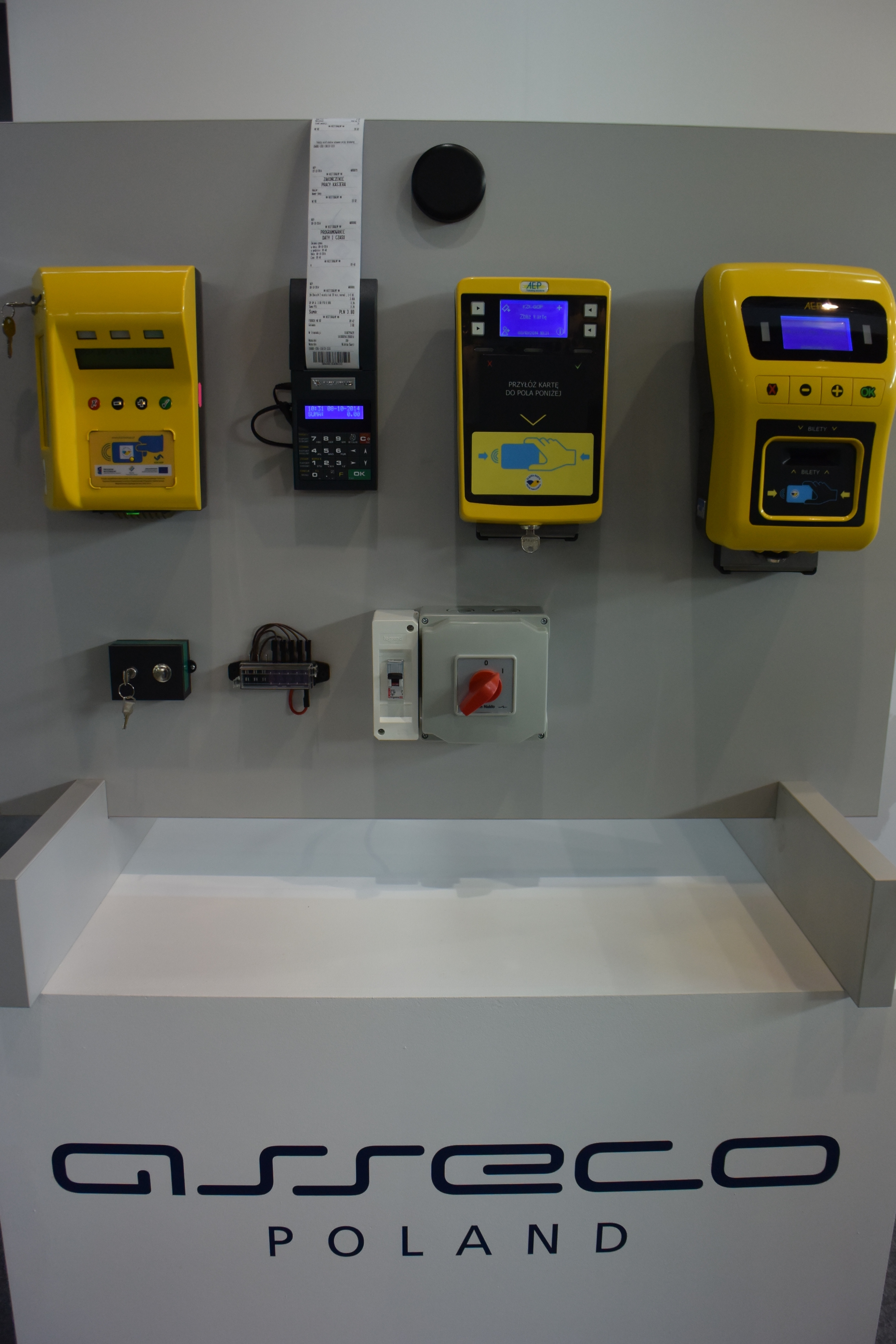 System biletowy Śląskiej Karty Usług Publicznych, Transexpo 2014, Kielce